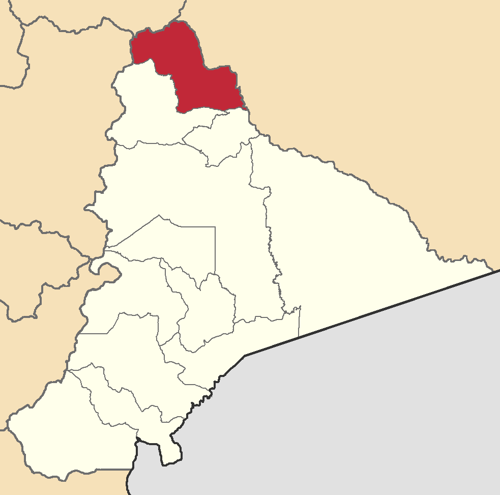 Mapa localizador del cantón en Morona-Santiago, Ecuador